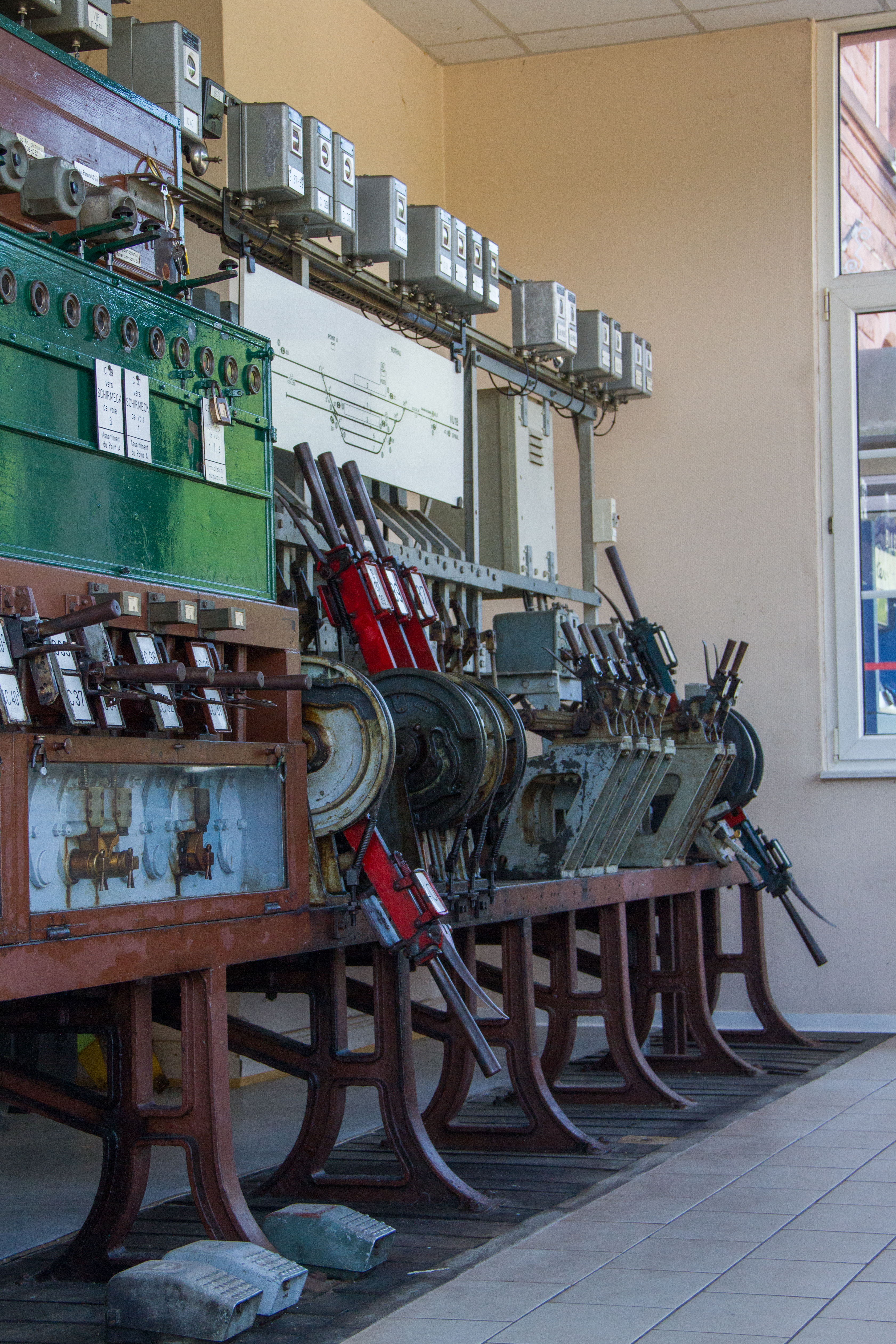 Gare SNCF de Rothau, 15 août 2013